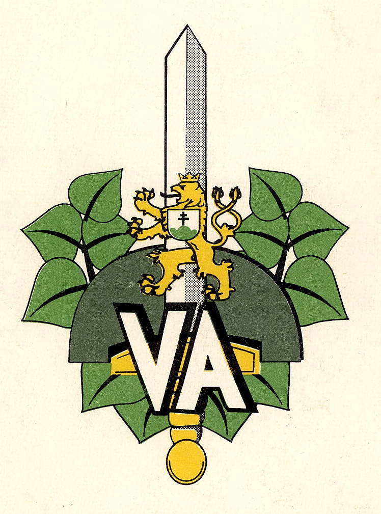 znak VA